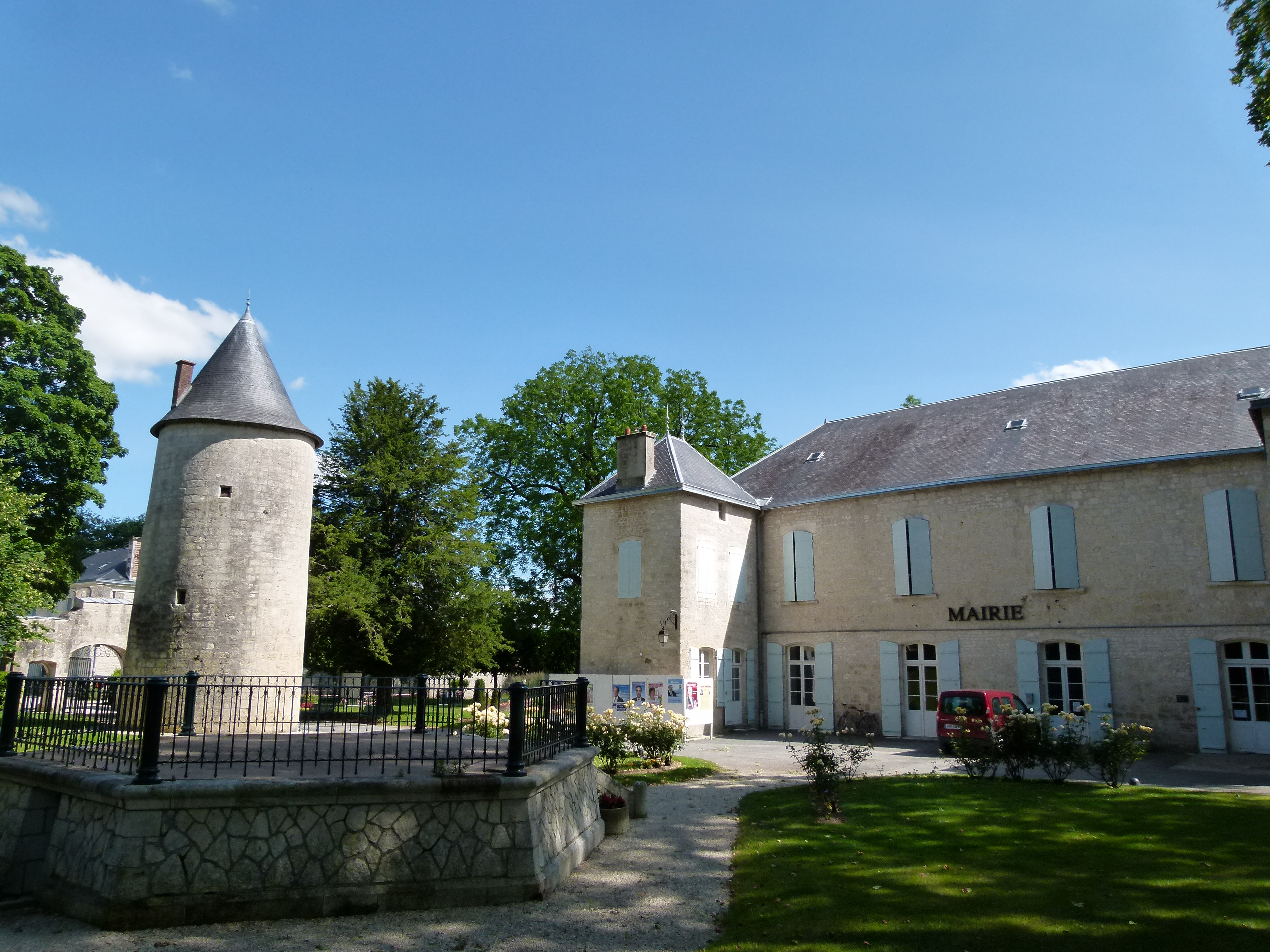 Le château de Surgères renferme la mairie de la ville en face de laquelle se trouve la Tour Hélène.